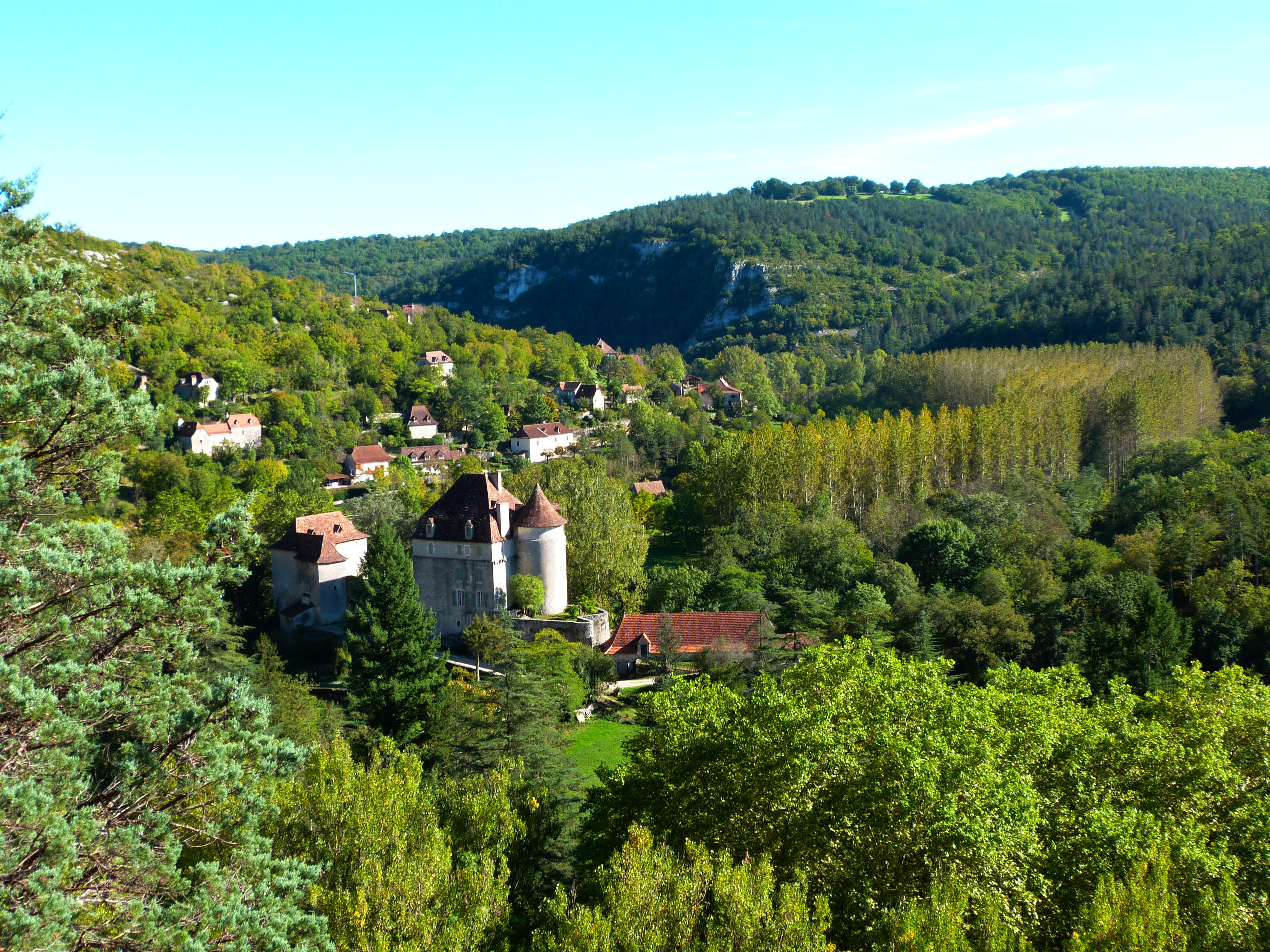 Château de Geniez .